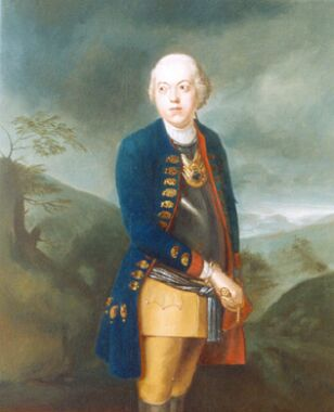 Gemälde von Hans Christoph Friedrich Graf von Hacke, 1722